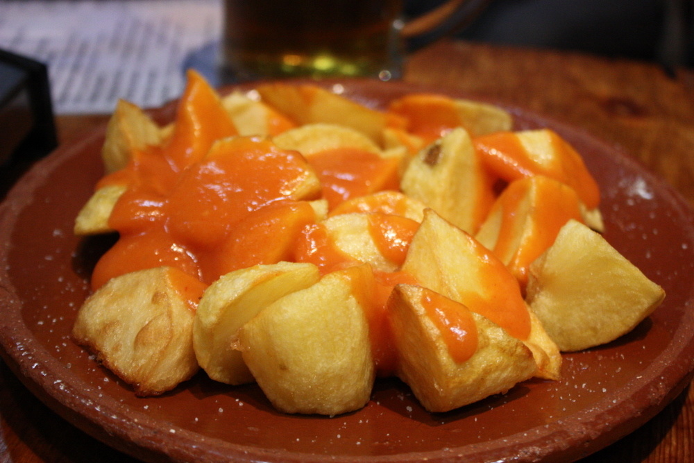 Plato de patatas bravas con salsa picante.